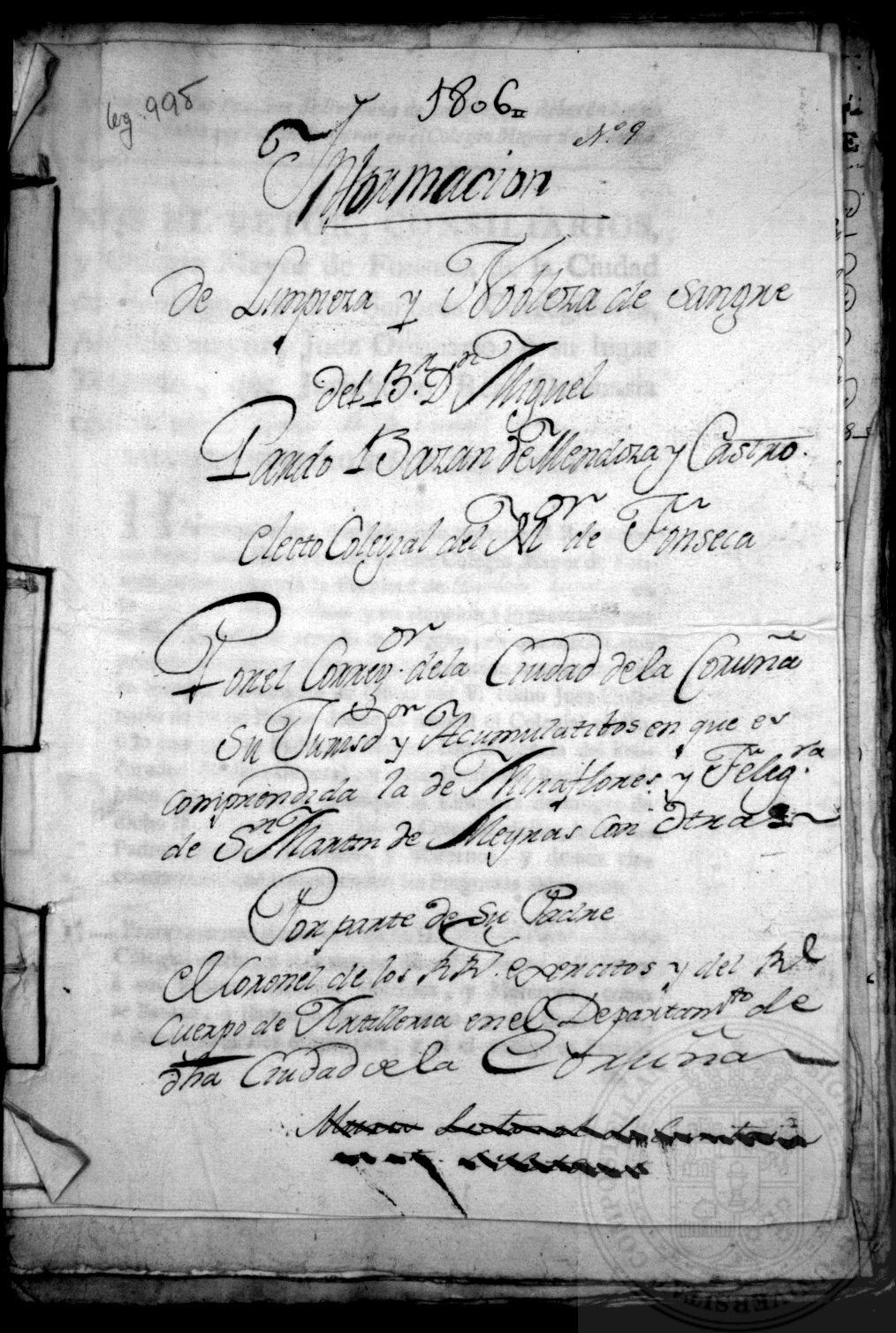 Pruebas de limpieza de sangre de Miguel Pardo Bazán de Mendoza y Castro, natural de Sta. Mariña Doza, opositor a una beca cánones del Colegio de Fonseca